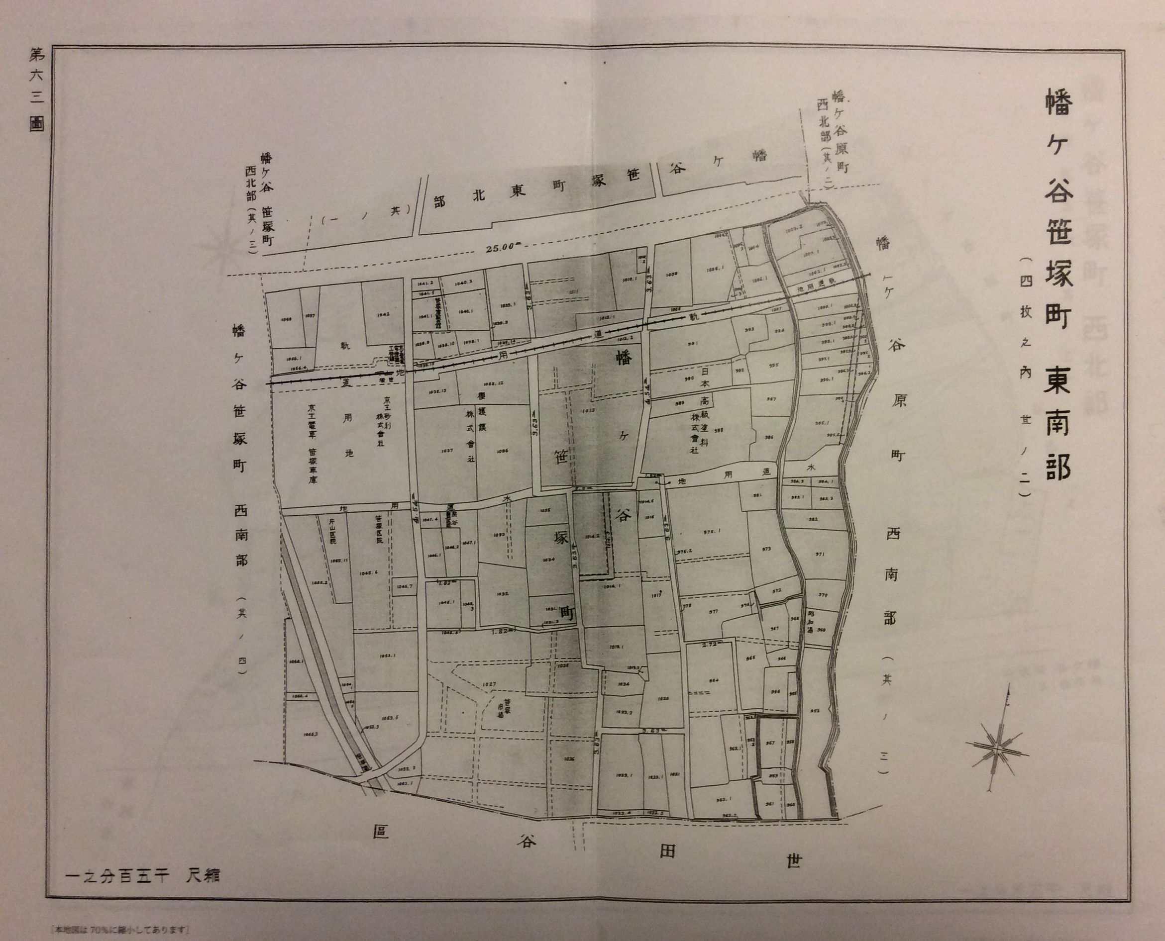 （2014年12月25日撮影）